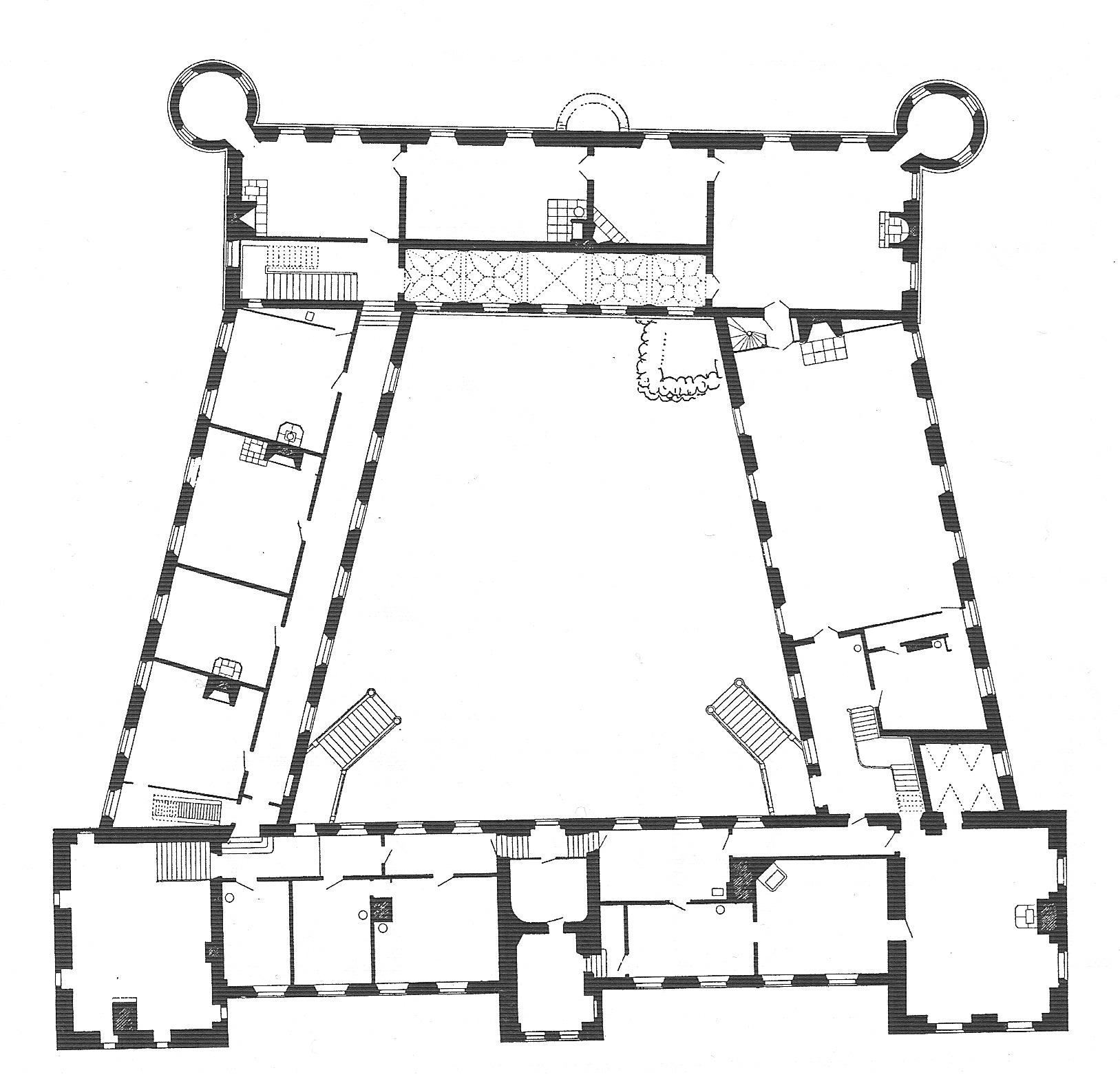 Grundplan af Rosenholm, udført af kunstakademiet i 1891.